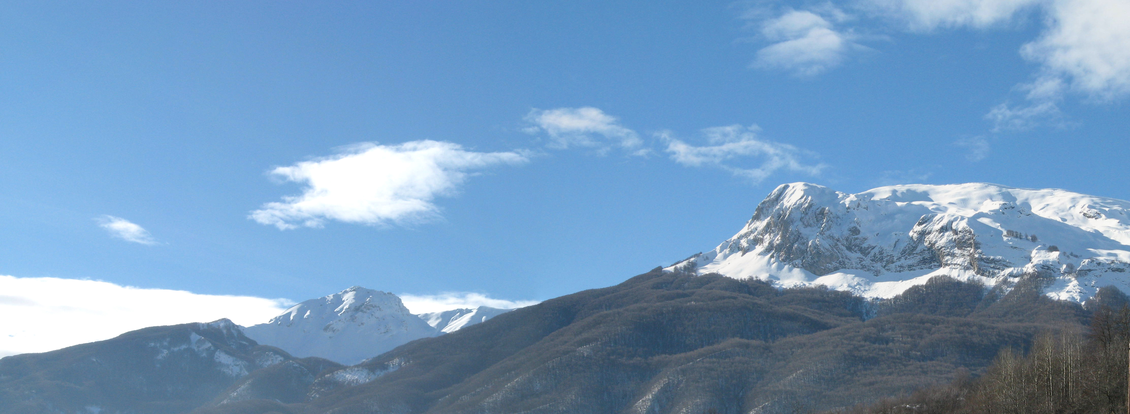 Панорама на Дешат от селото Требище (Река), Република Македония.